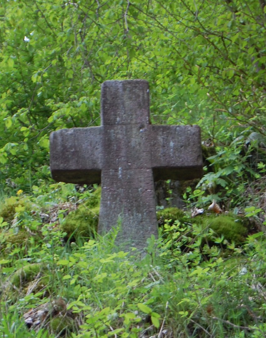 ehemaliger Standort der Kapelle zum heiligen Kreuz in Stolberg